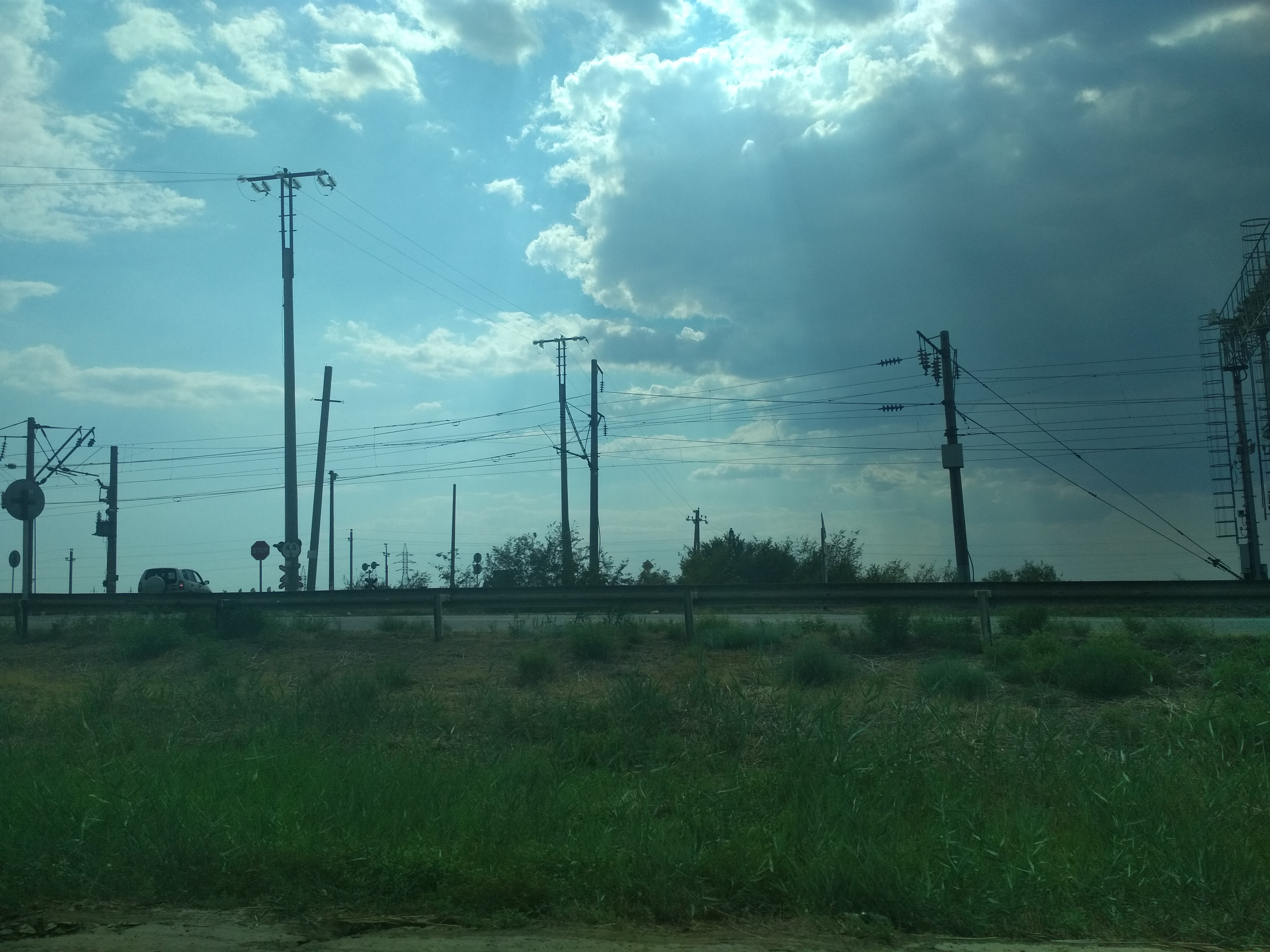 Нохчийн: ЖД переезд на Сенное